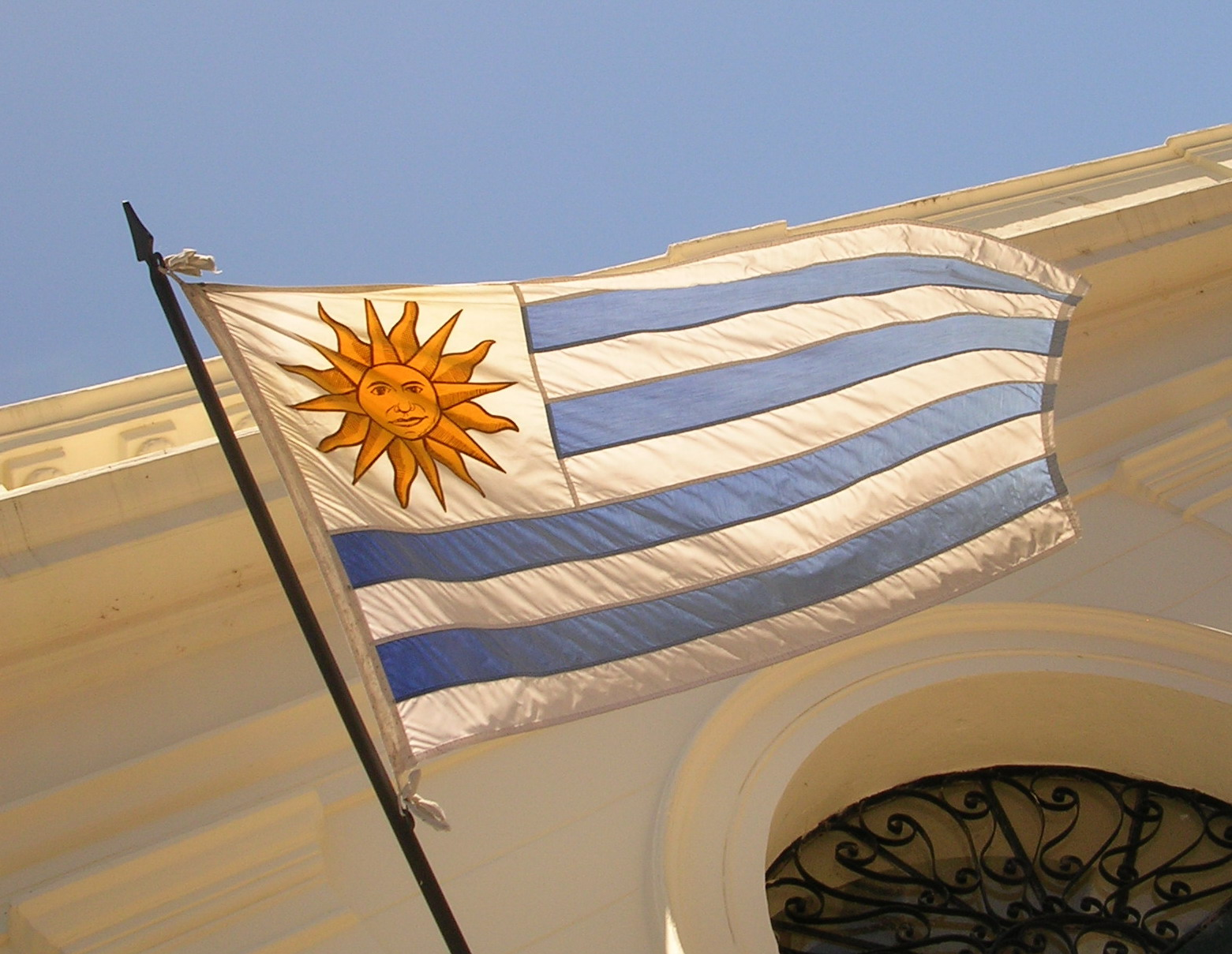 Bandera de Uruguay ondeando en un edificio en Colonia del Sacramento